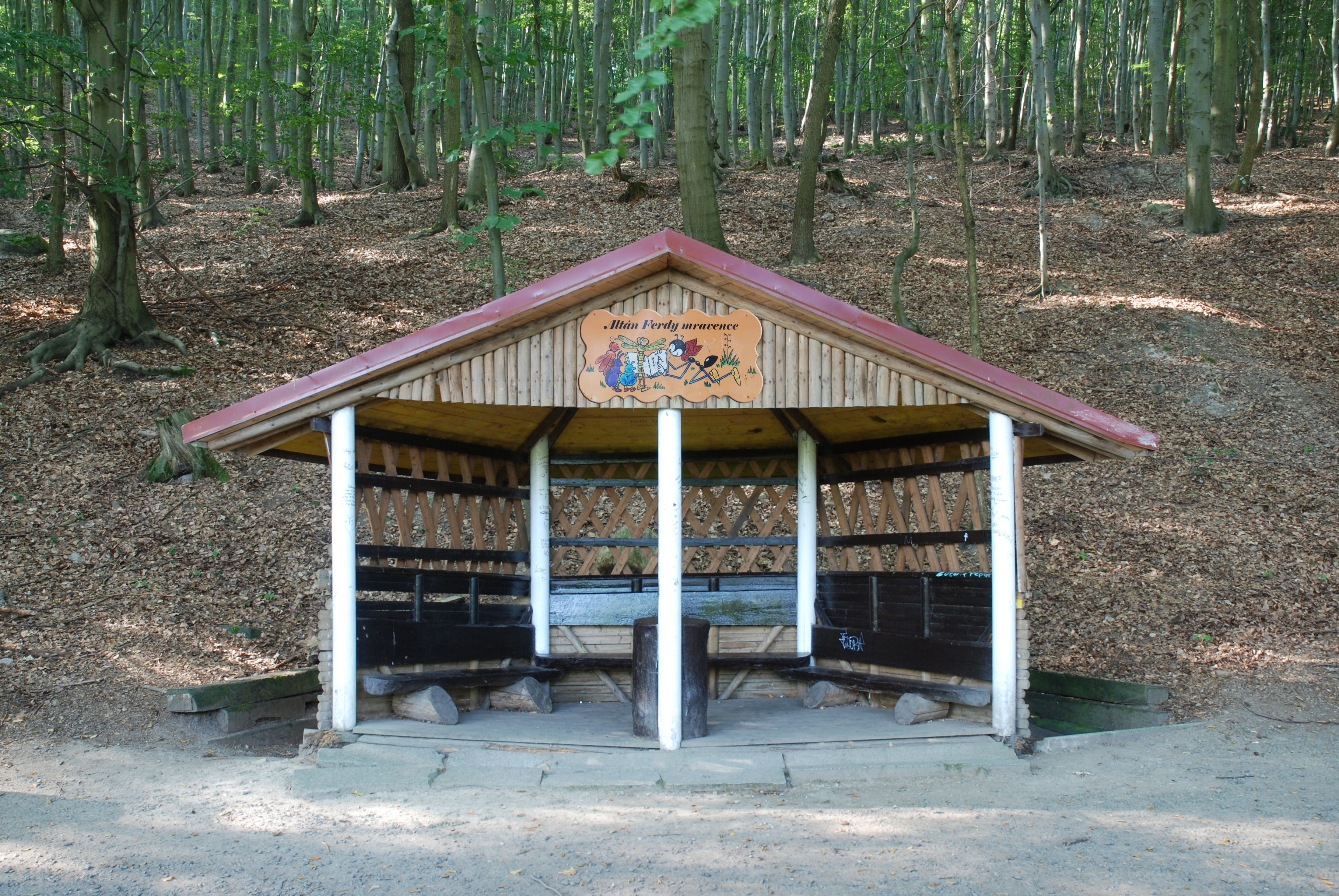 Altán Ferdy Mravence na dětském hřišti v Karlových Varech – Drahovicích